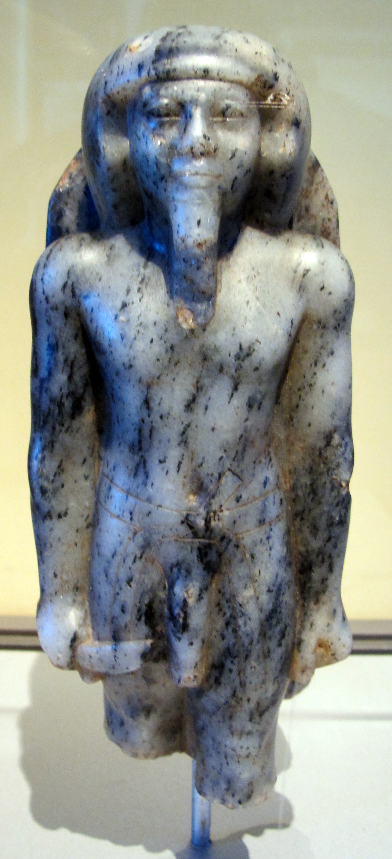 Egyptian antiquities in the Brooklyn Museum